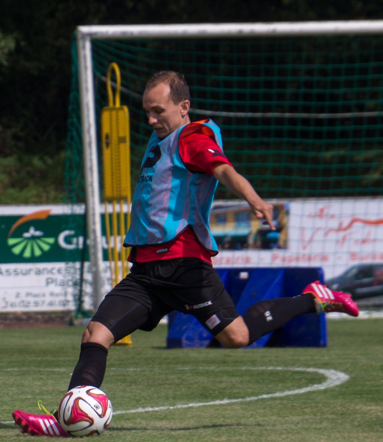 Thibault Giresse à l'entrainement le 11 juillet 2014